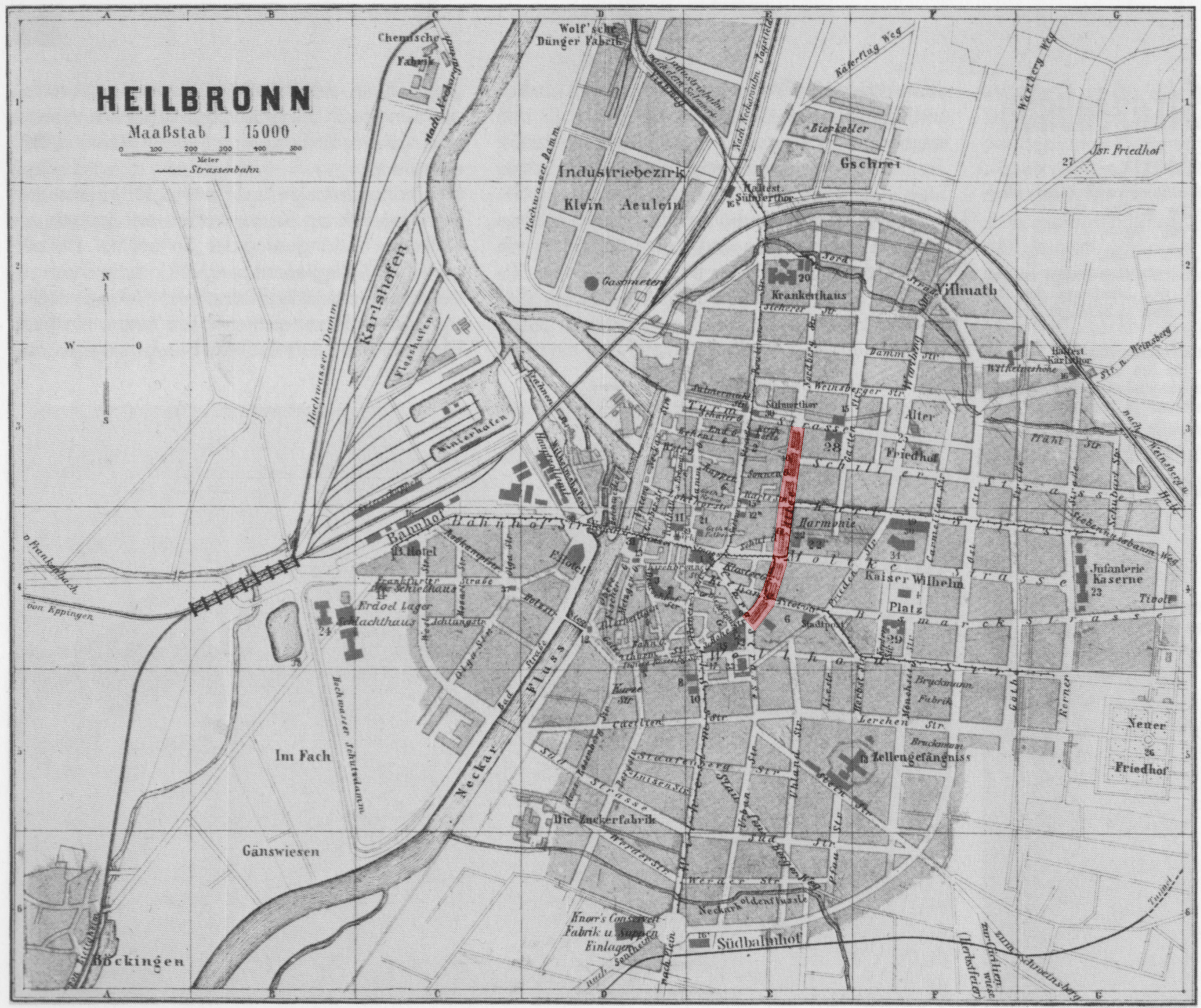 Stadtplan von Heilbronn 1903, rot hervorgehoben die „Allee“